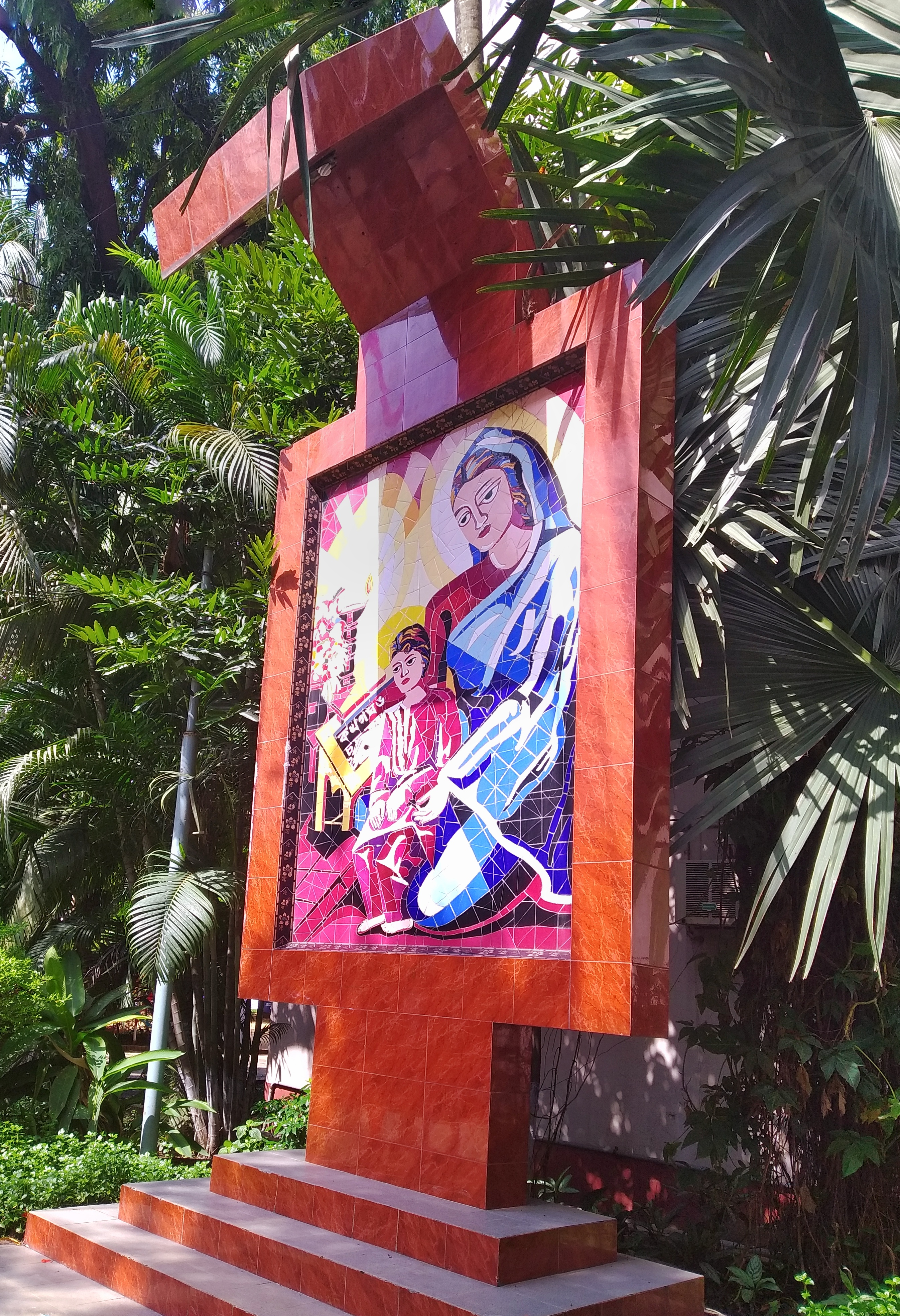 নটর ডেম কলেজের সম্মুখ অংশে মাতা মেরির কোলাজচিত্র